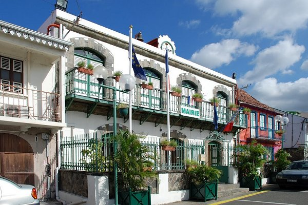 Mairie de Case-Pilote (Martinique)